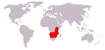 Bewerking afbeelding: Afbeelding_(kaart).JPG